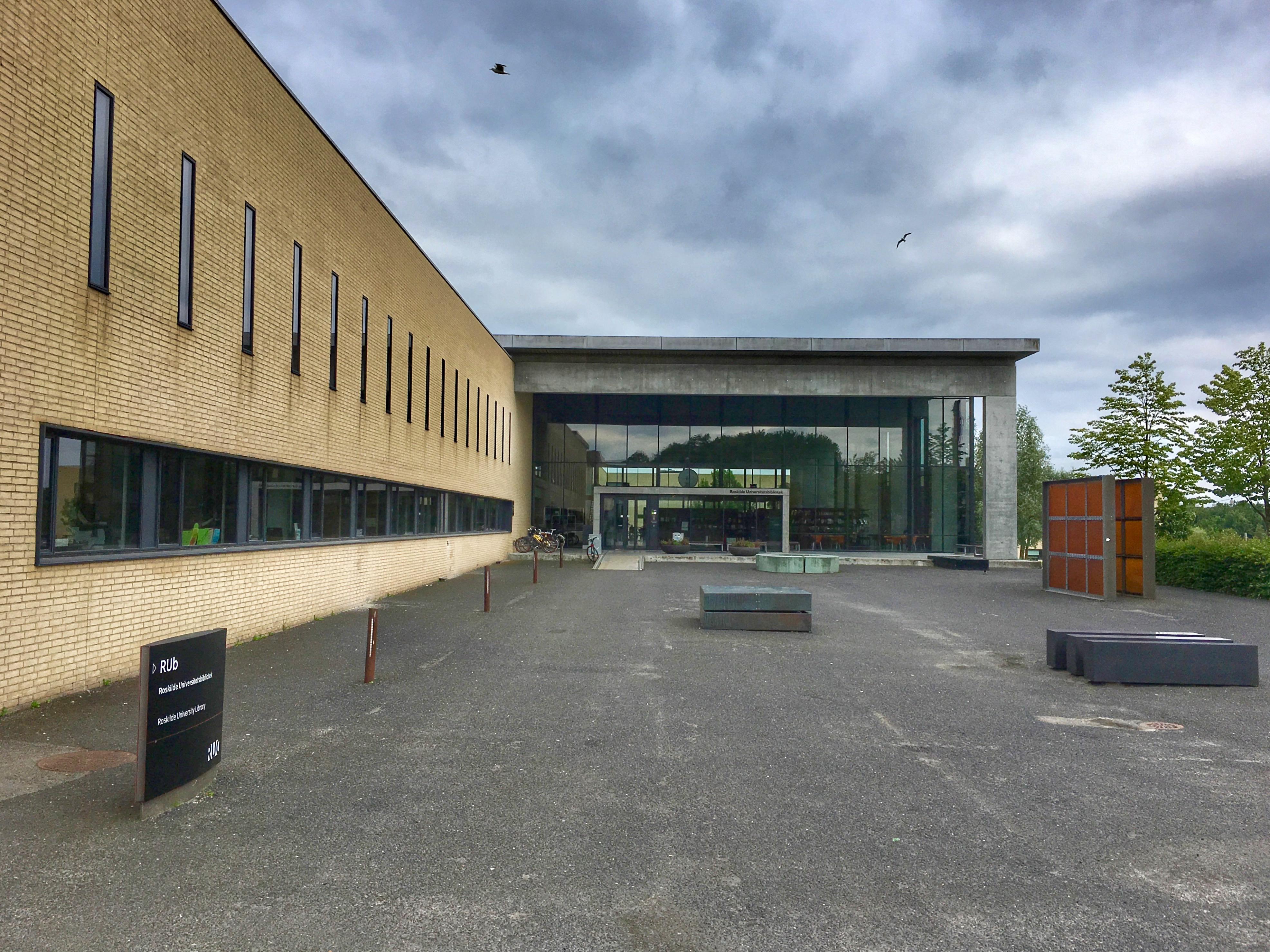 Roskilde Universitetsbibliotek, Roskilde